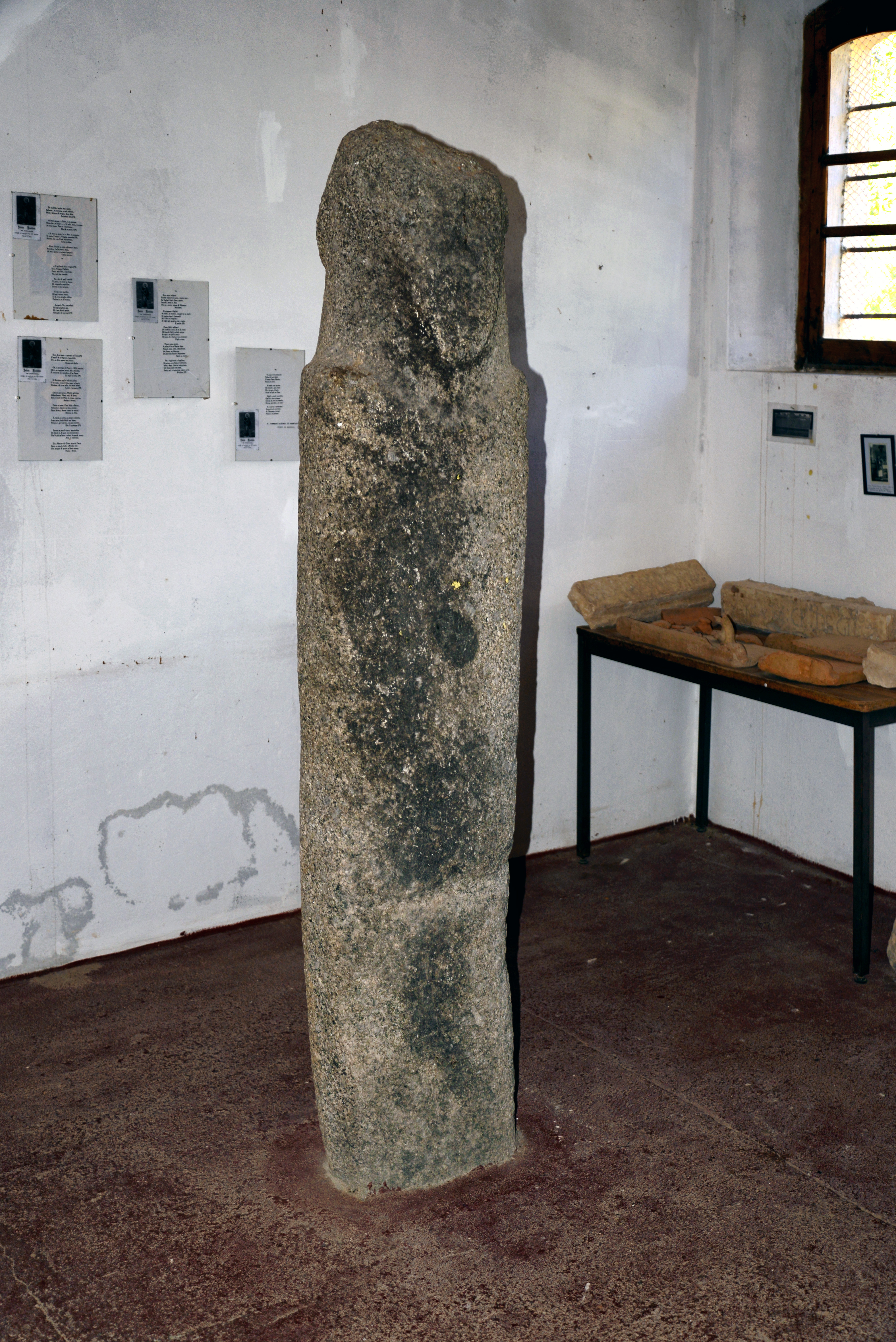 Calenzana, Balagne (Corse) - Statue-menhir type "armée", se trouvant dans la sacristie de l'église Santa Restituta